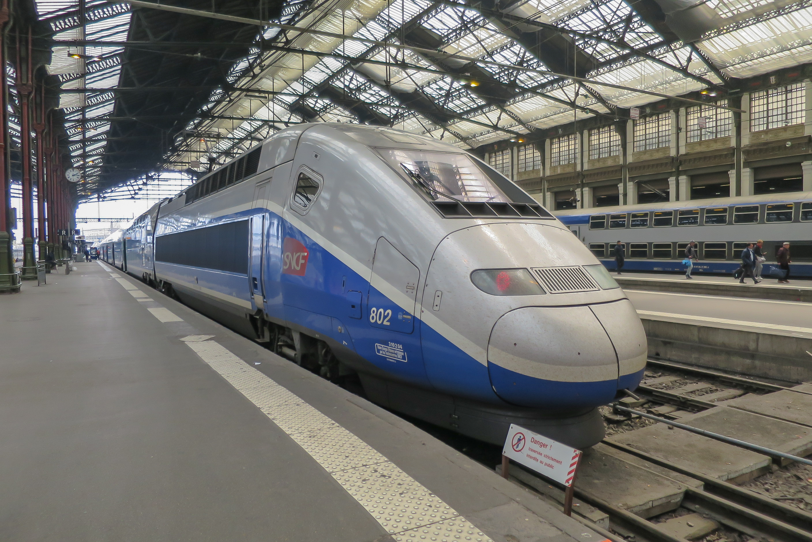 Rame TGV dans la gare de Paris-Gare-de-Lyon / Paris / France